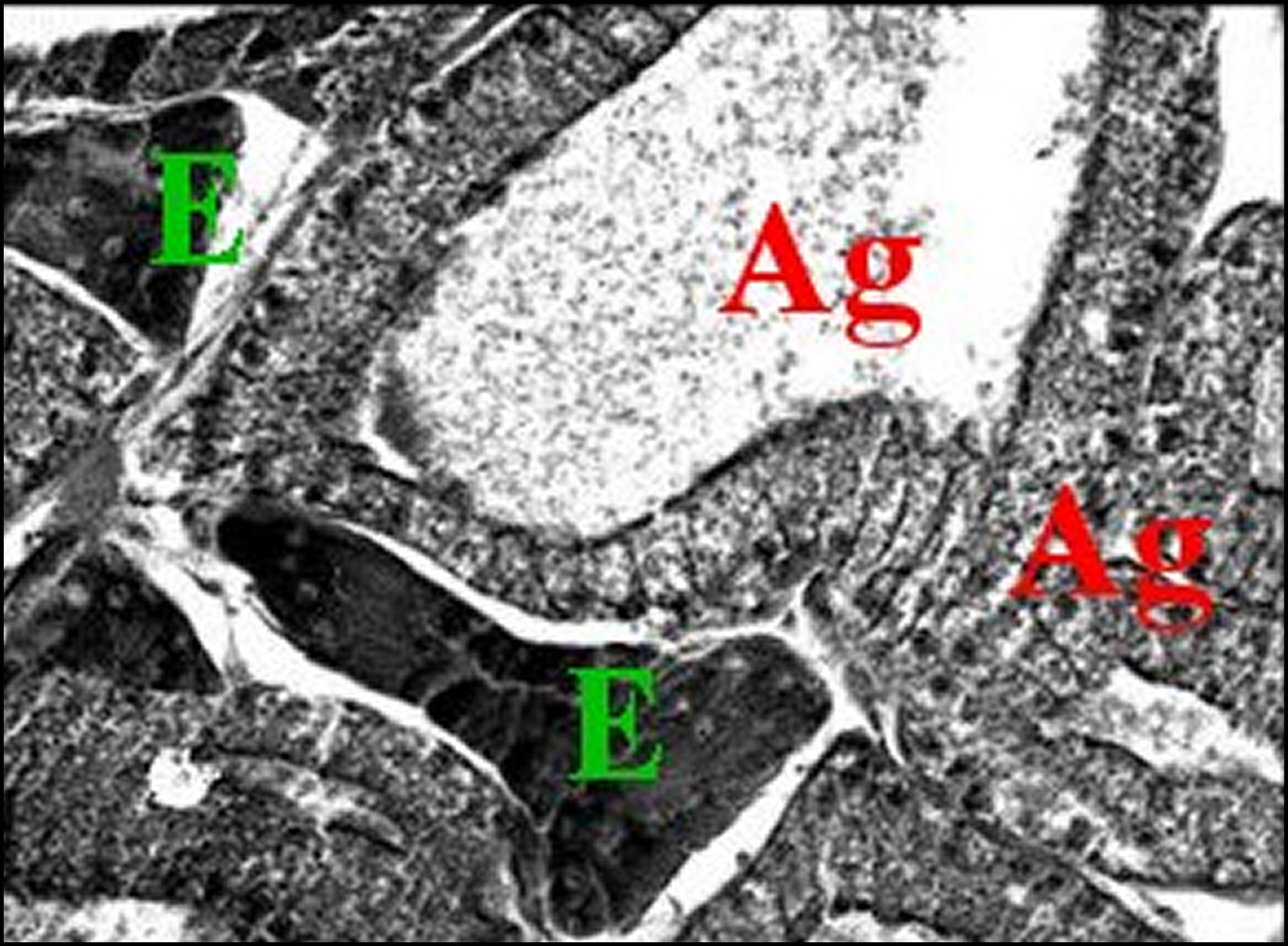 Autre coupe histologique d'abdomen de Poecilopachys montrant le tissu endocrinoïde